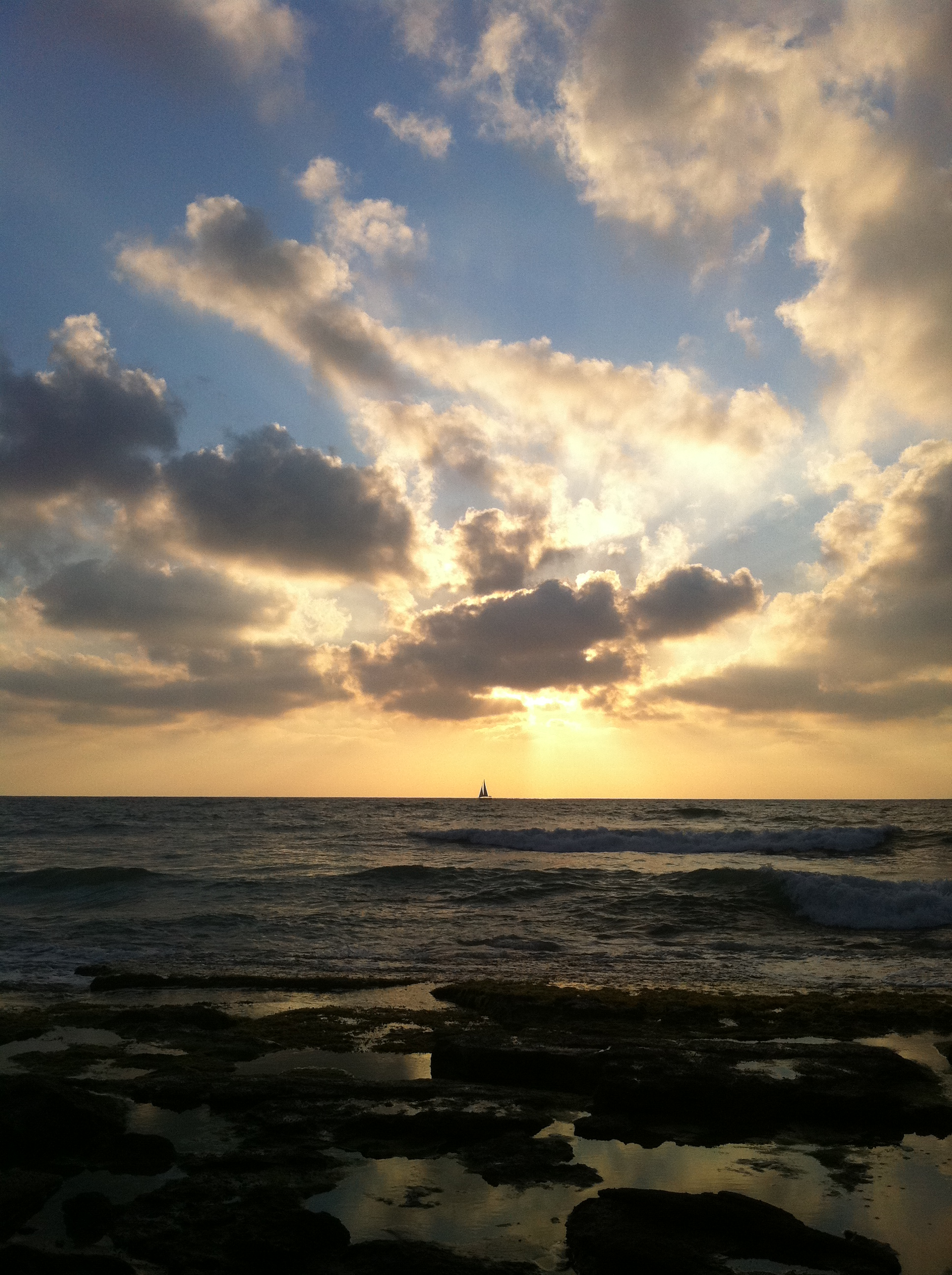 שקיעה בחוף שפיים, סירת מפרס נראית באופק